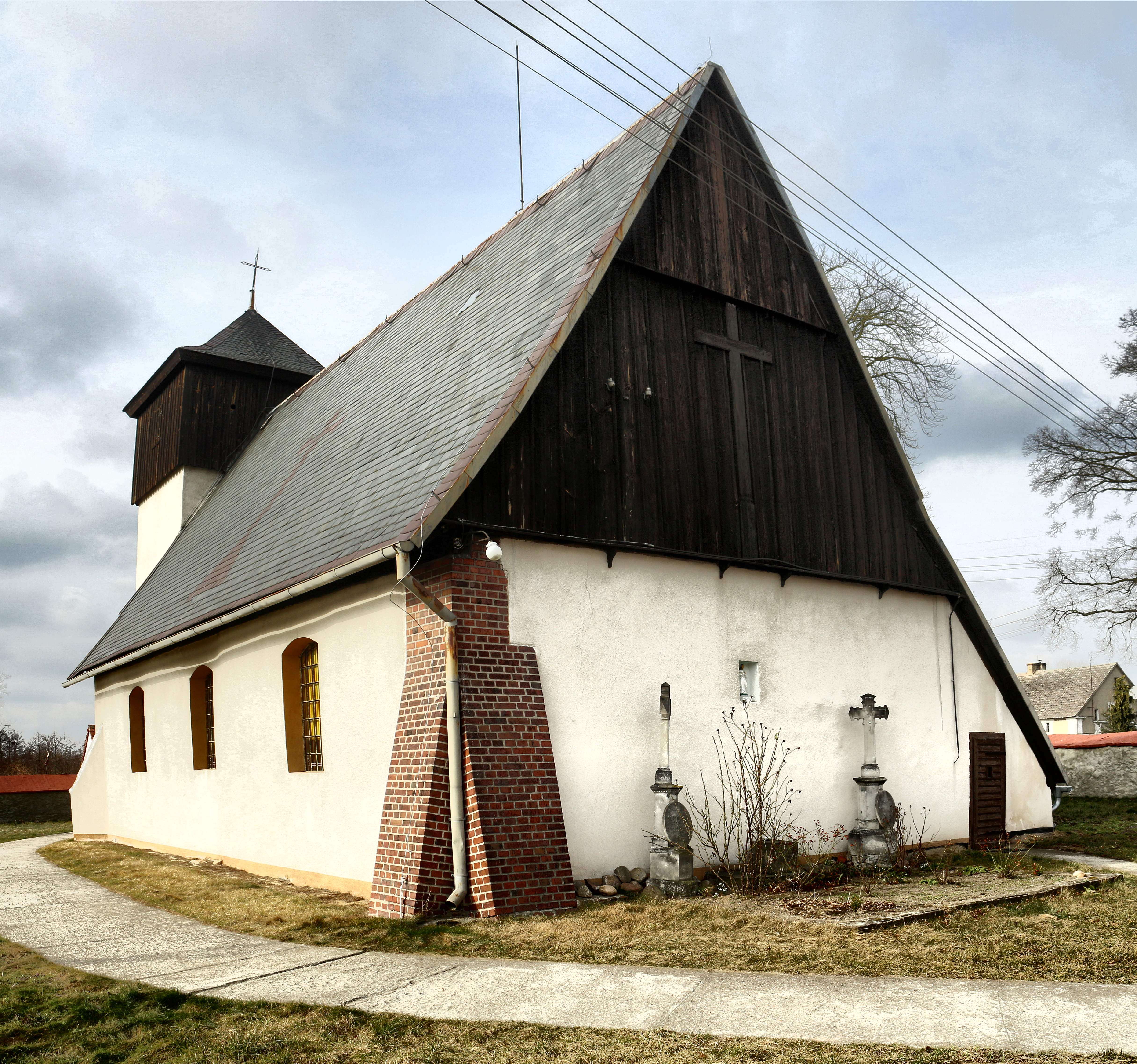 Tylewice, kościół